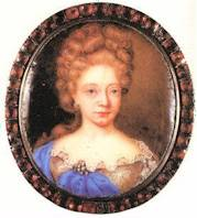 Sophie Amalie Moth, Gräfin von Samsoe (* 1654; +1719), Mätresse König Christians V. von Dänemark und Norwegen